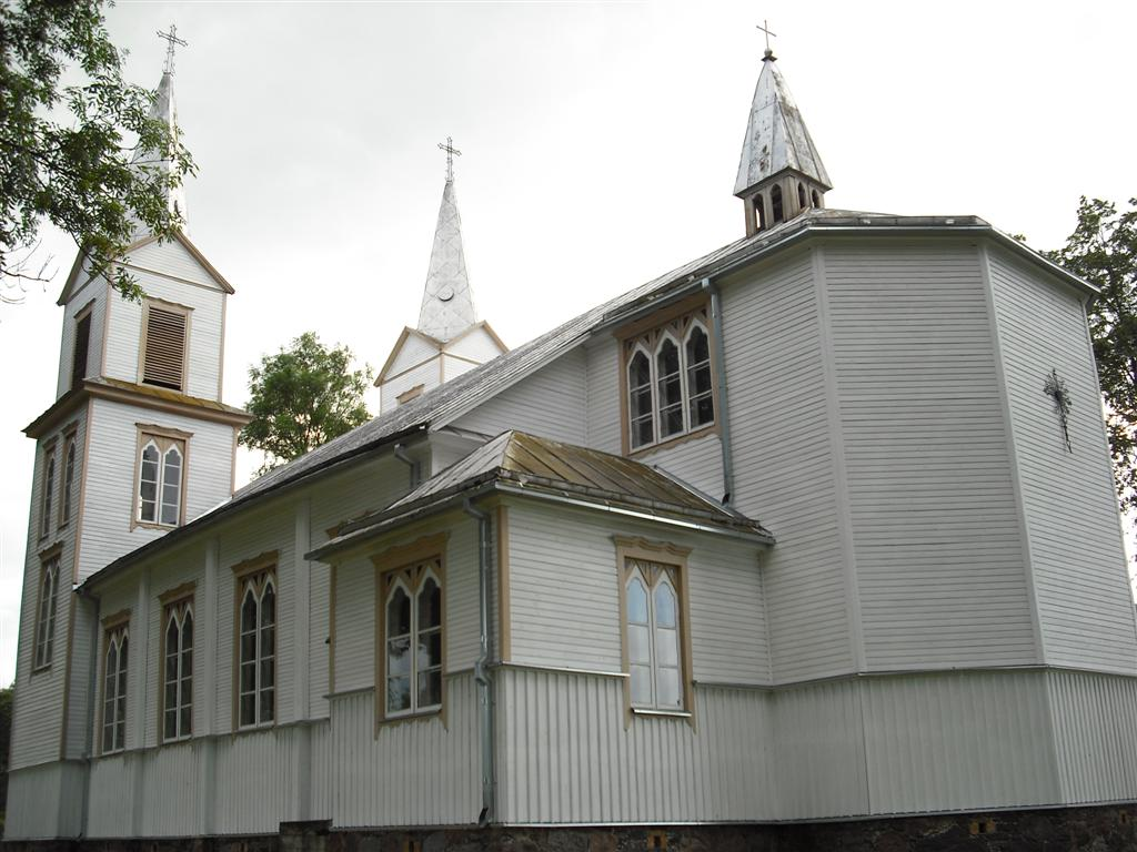 Kirdeikių Šv. Jono Krikštytojo bažnyčia